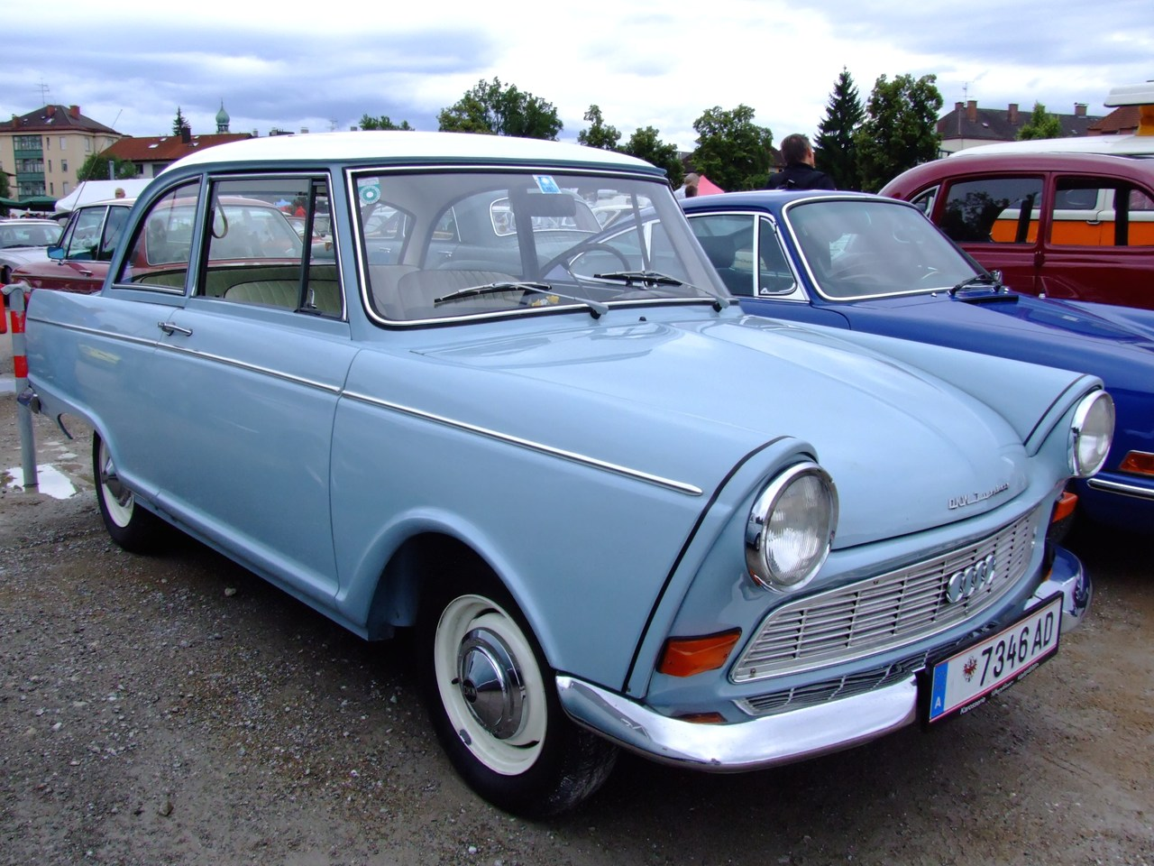 Quelle: selbst fotografiert, 07/2007 Fotograf: Späth Chr.